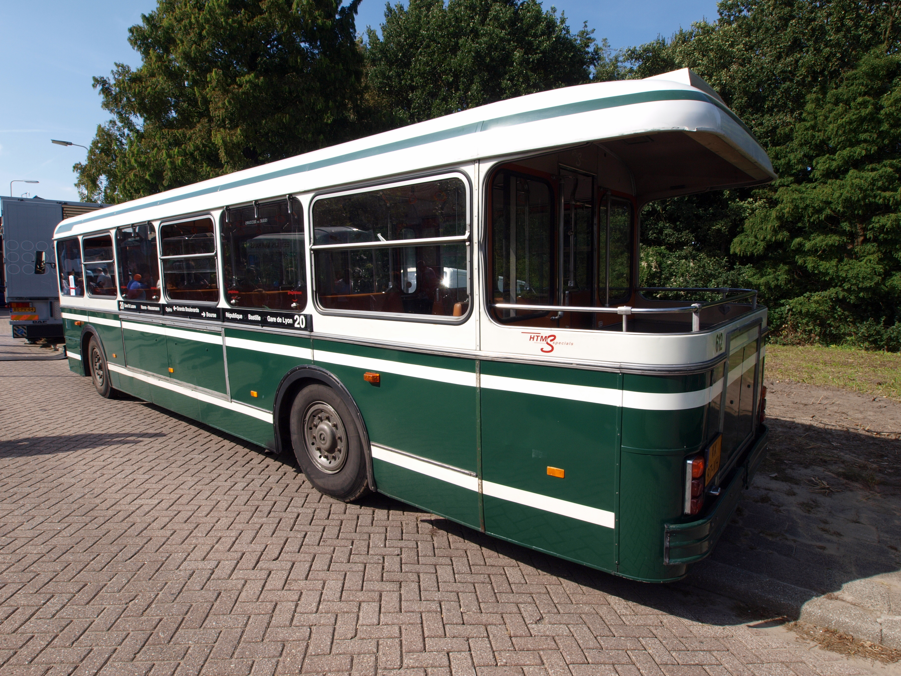 1977 Saviem SC10U